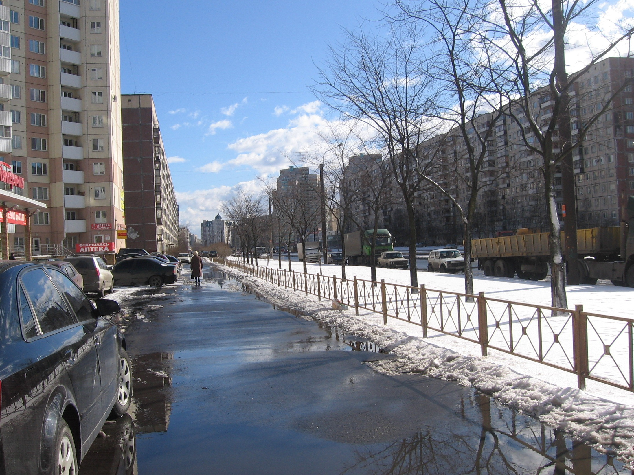 Март. Проспект Наставников.